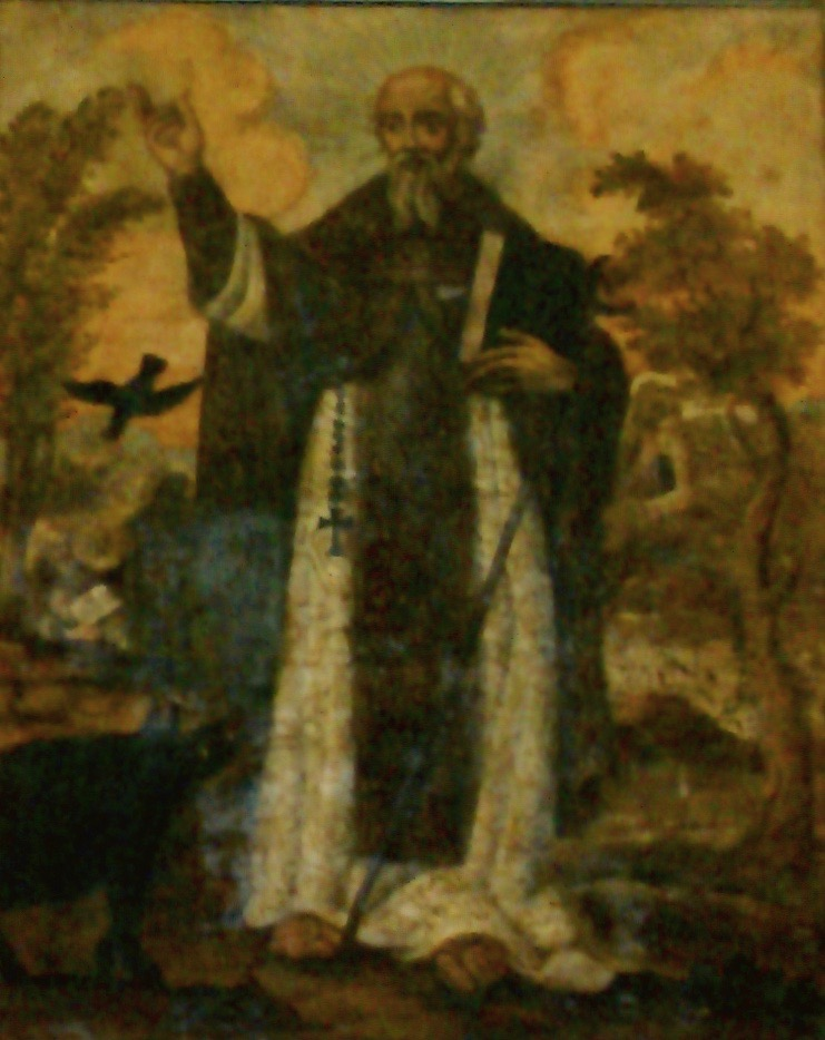 Cuadro de San Antón reubicado en la iglesia parroquial de Fuenllana, originalmente ubicado en la iglesia de Santa Catalina.